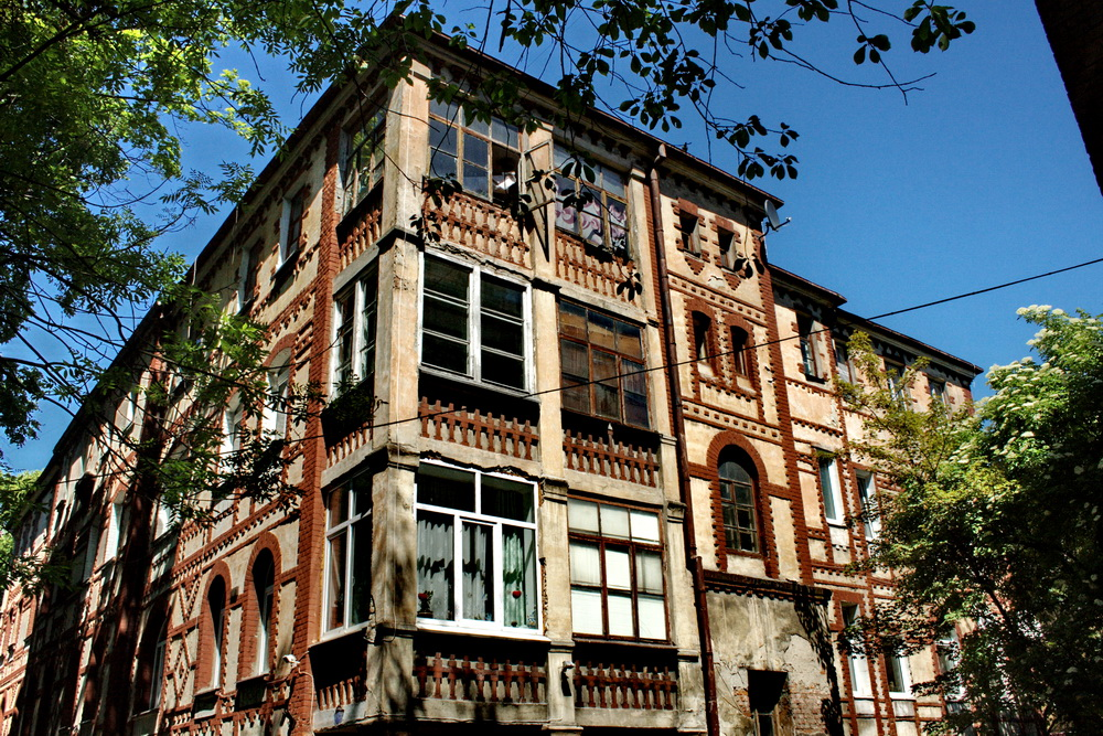 ul. Komsomolskaya (Luisenallee)